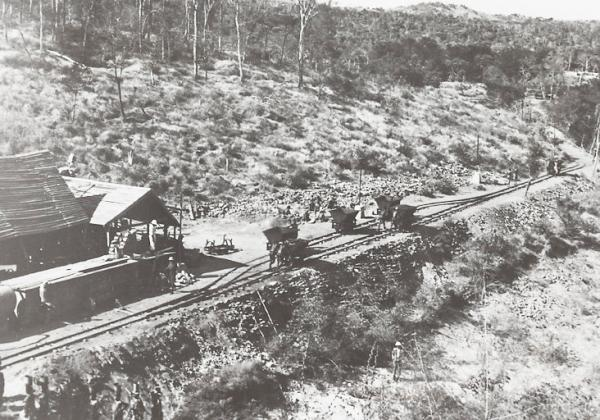 Charbonnage de la Sakoa. Evacuation du charbon. Wagonnets sur une voie Decauville.